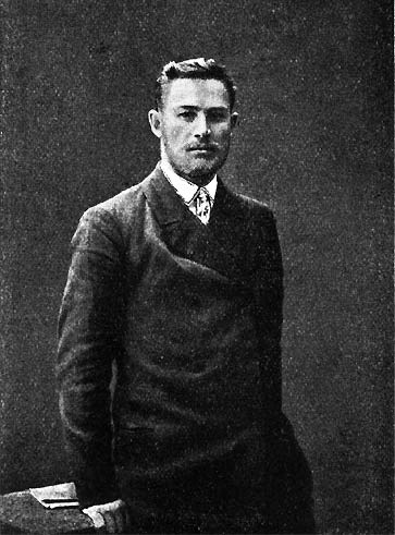 Константин Иванович Молодцов (иногда Молодцев[1]; 20 мая 1873, Тобольская губерния — после 1912) — крестьянин, волостной писарь, депутат III Государственной думы от Тобольской губернии (1907—1912).